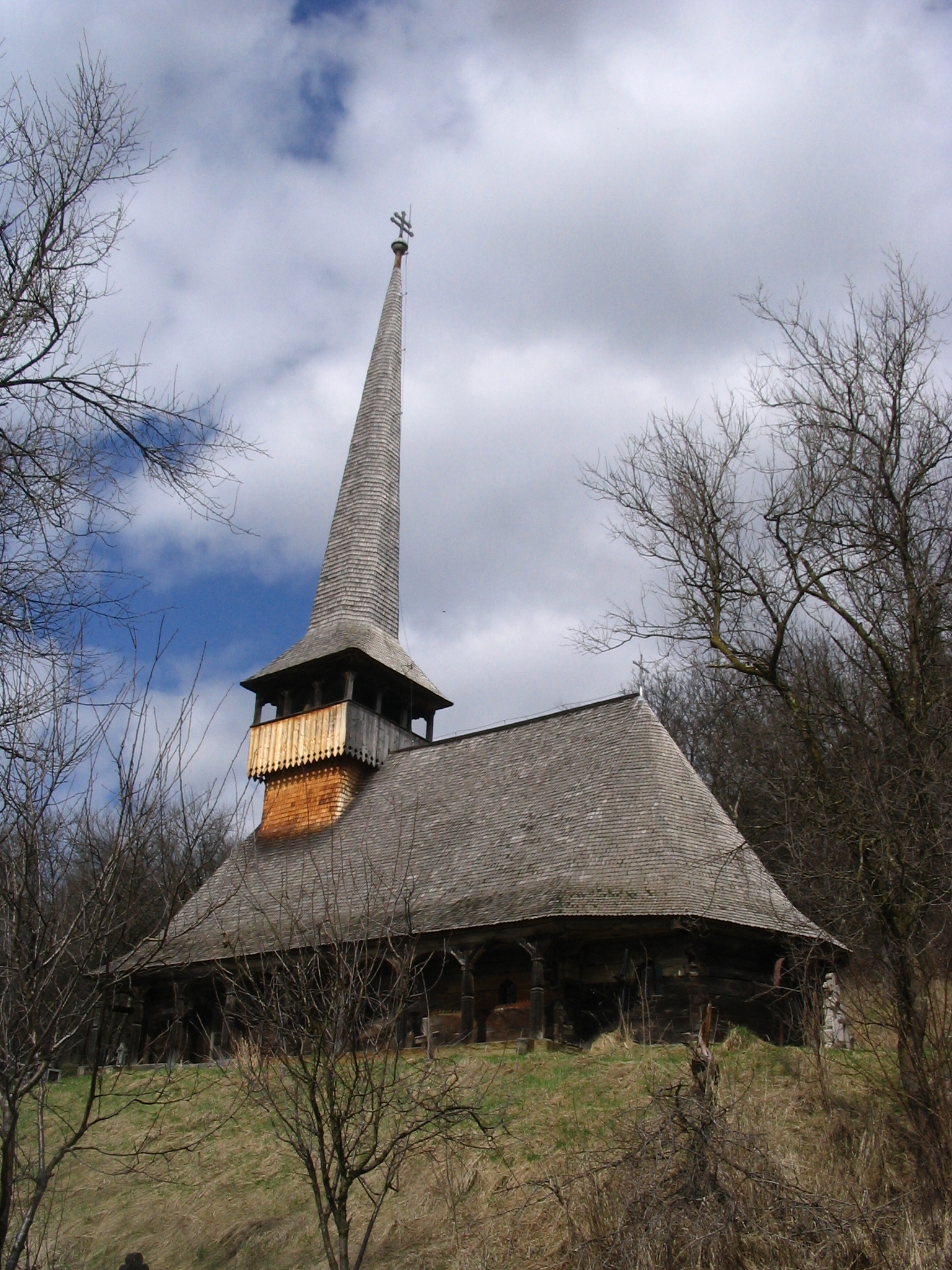 Biserica de lemn din Voivodeni, judeţul Sălaj. Autor: Bogdan Ilieş Data: aprilie 2006